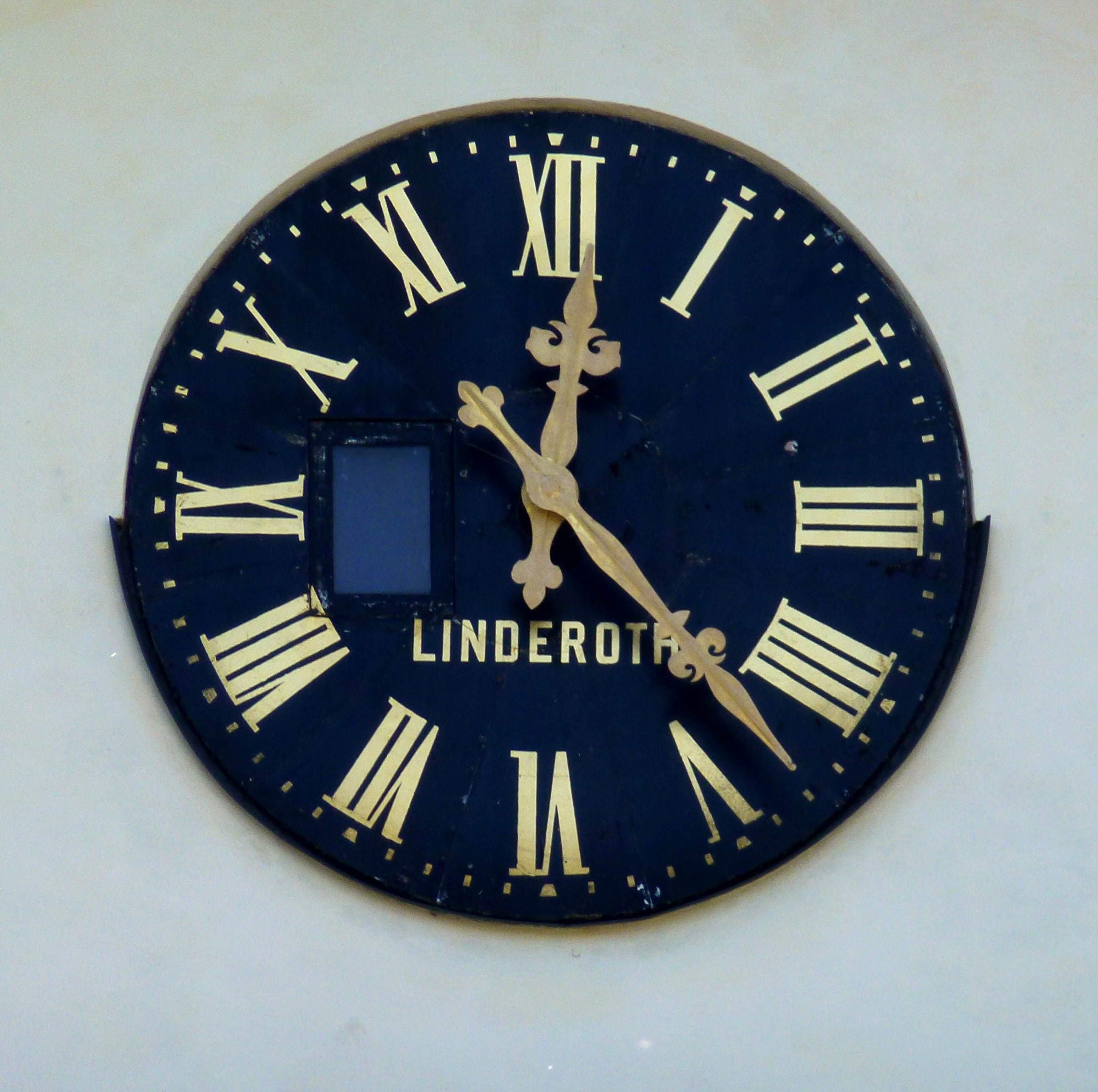 Landstingshusets ur